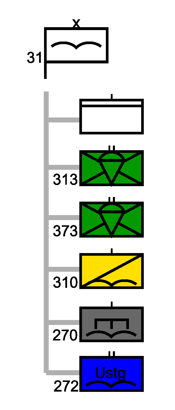 Gliederung Luftlandebrigade 31 im deutschen Heeres.